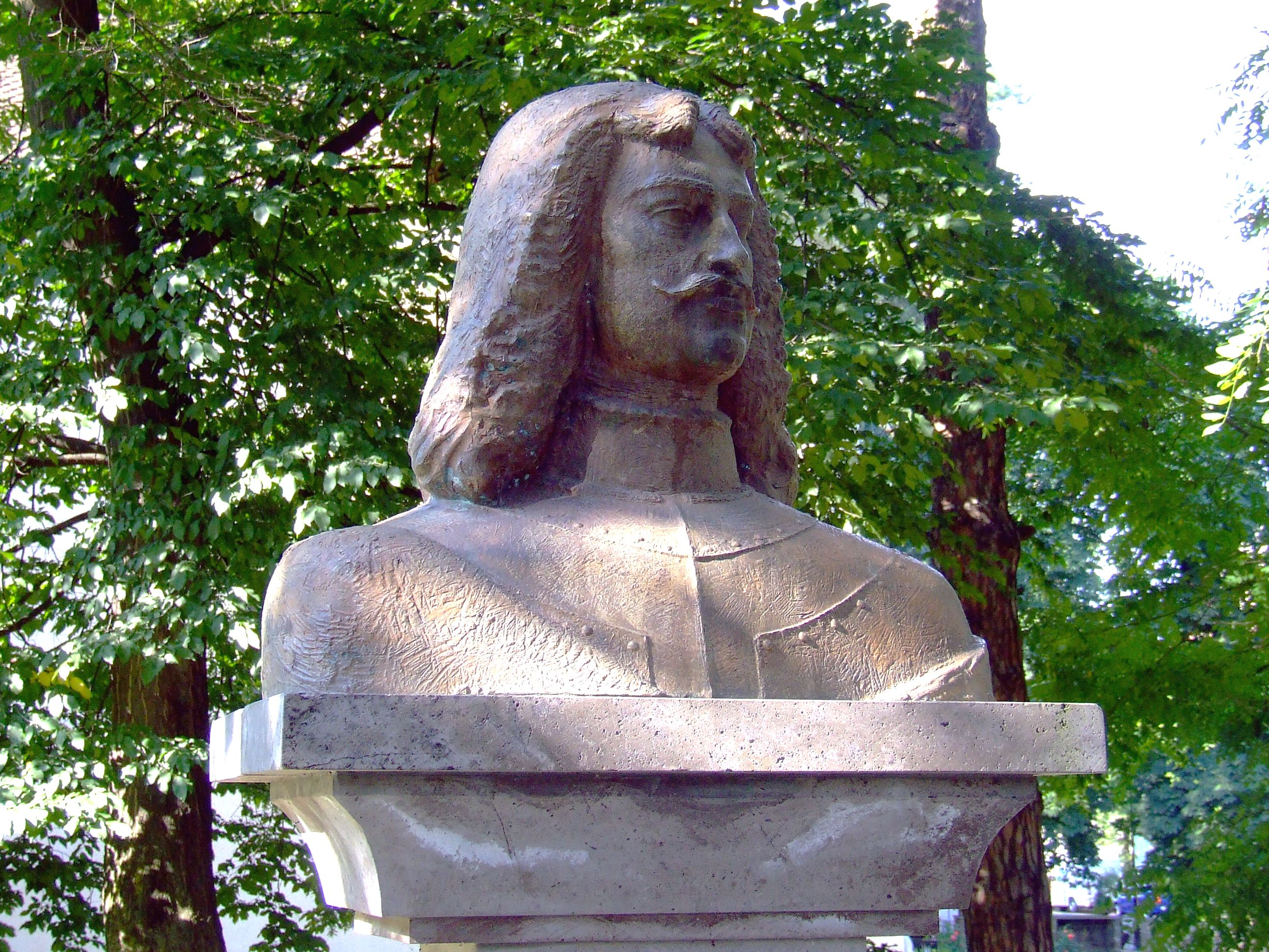 II. Rákóczi Ferenc mellszobra Sepsiszentgyörgyön. Vargha Mihály kézdivásárhelyi születésű (1961) szobrászművész alkotása (2004)